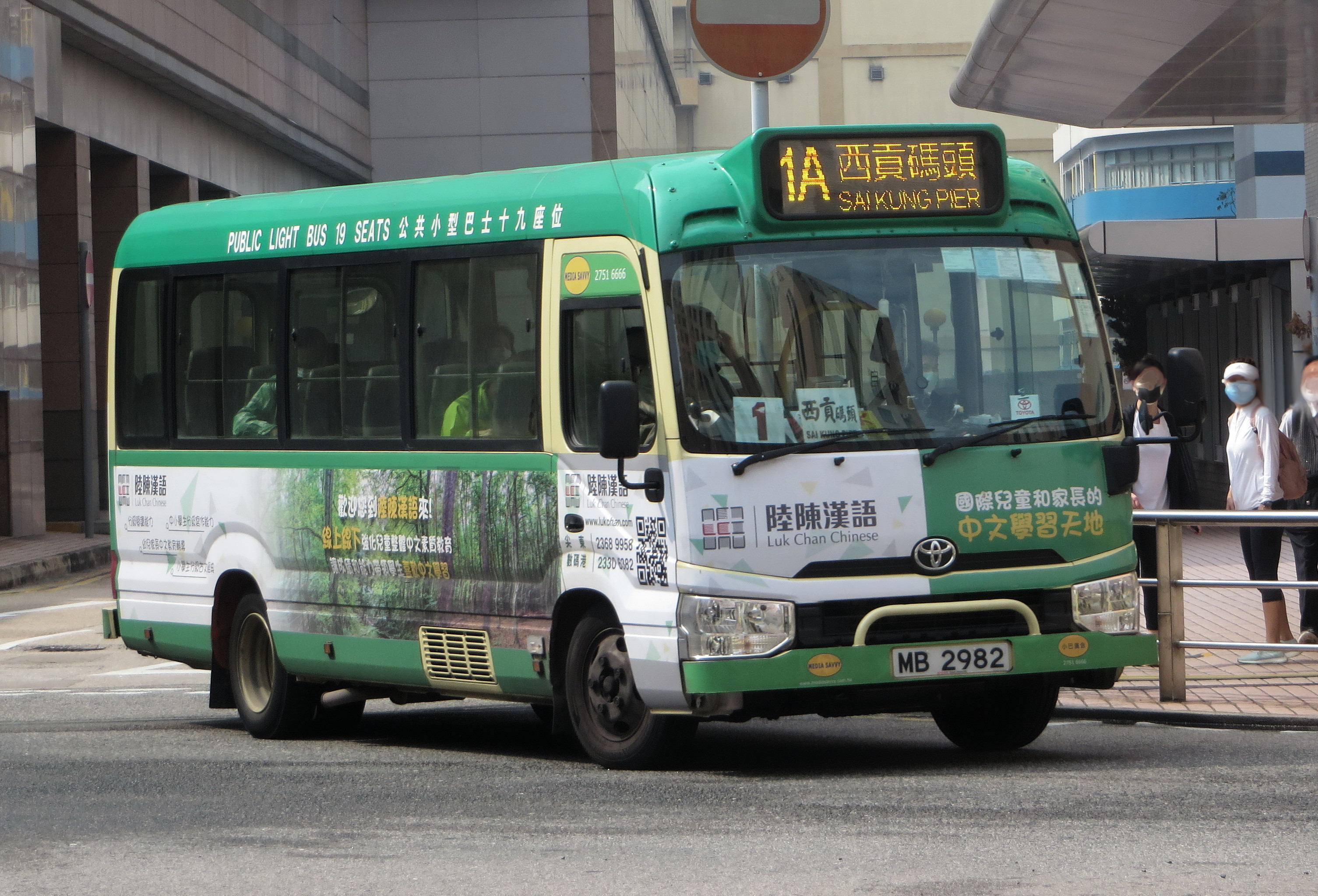 中文（中国大陆）: 小巴MB2982的照片